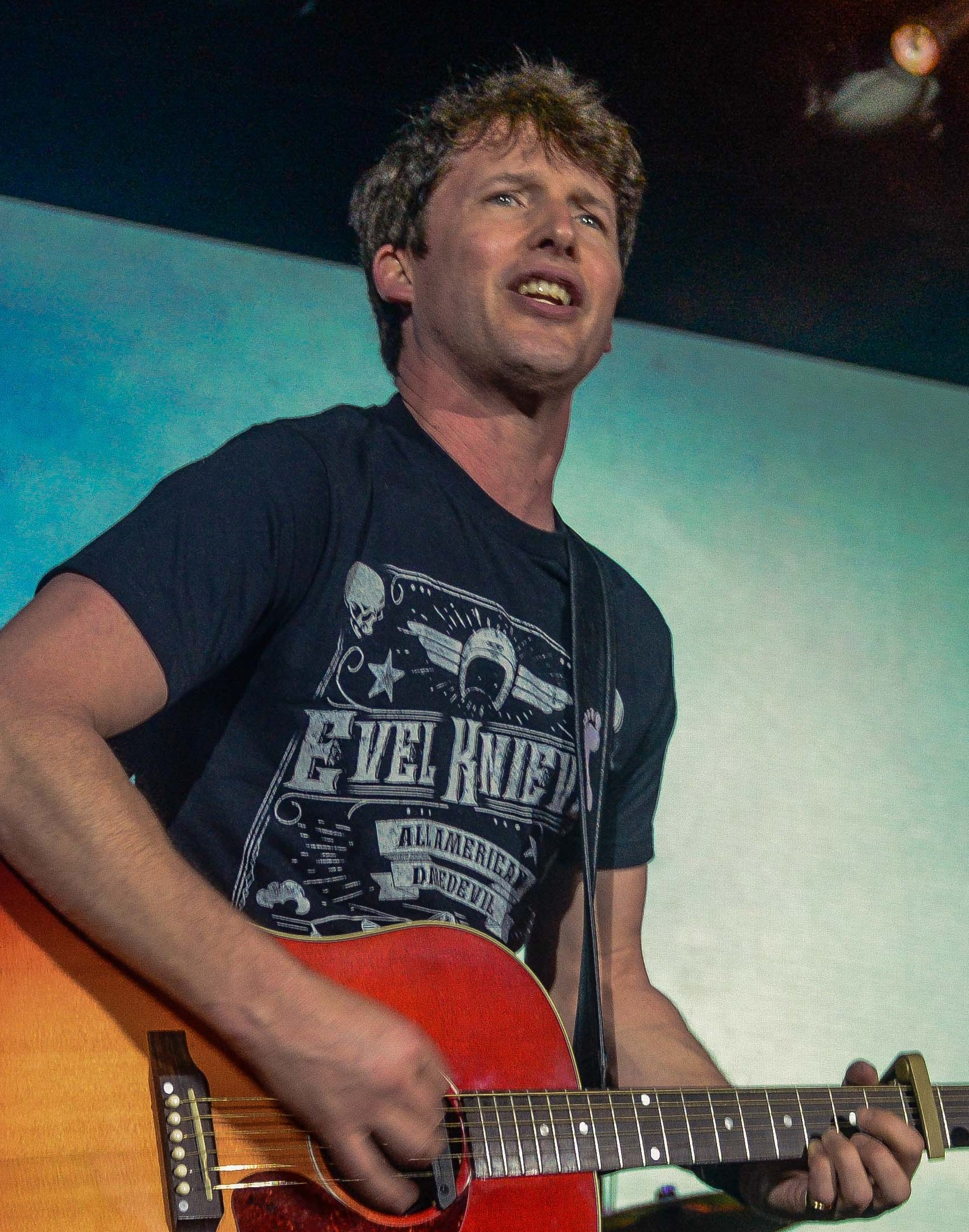 Blunt em fevereiro de 2018, Brasil